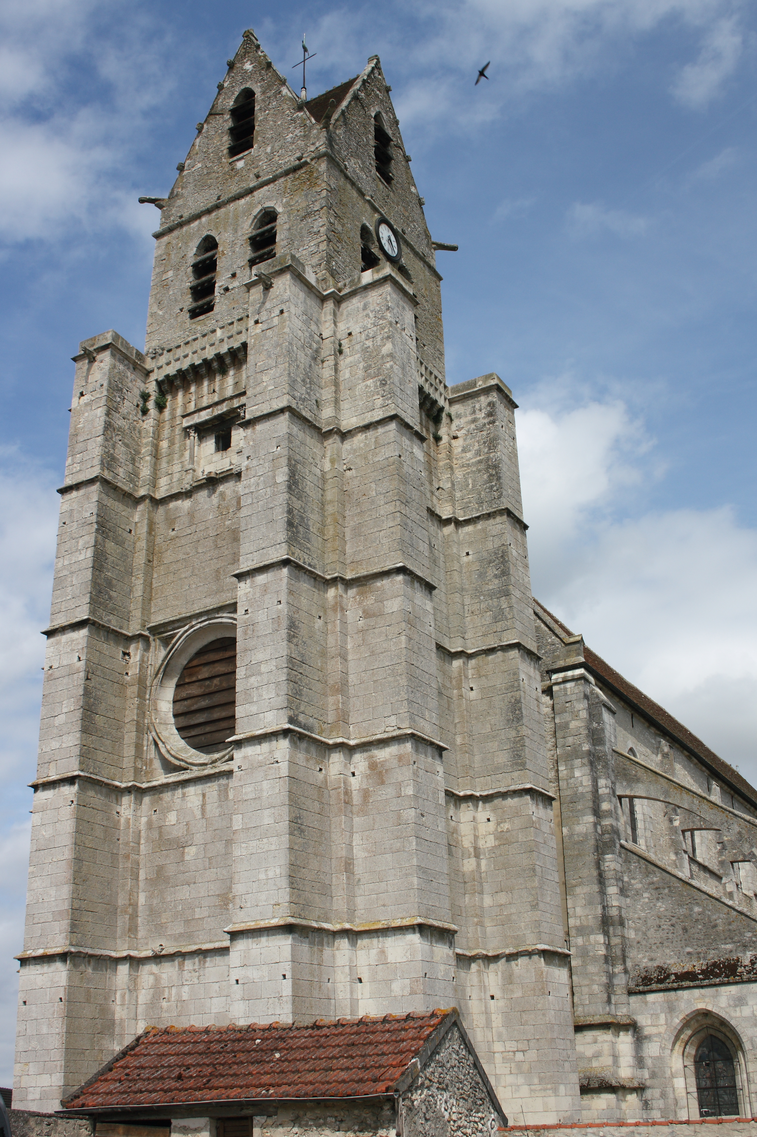 katholische Kirche Saint-Martin in Étampes